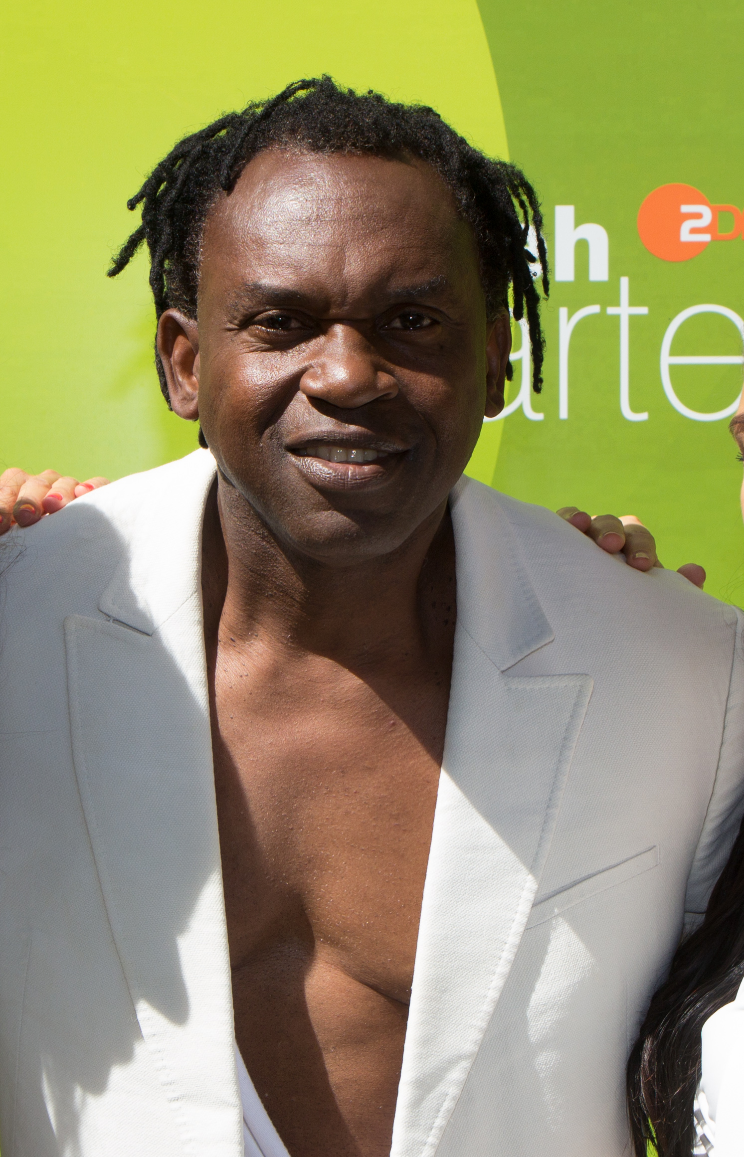 Dr. Alban als Gast im ZDF-Fernsehgarten am 12. August 2018 in Mainz.